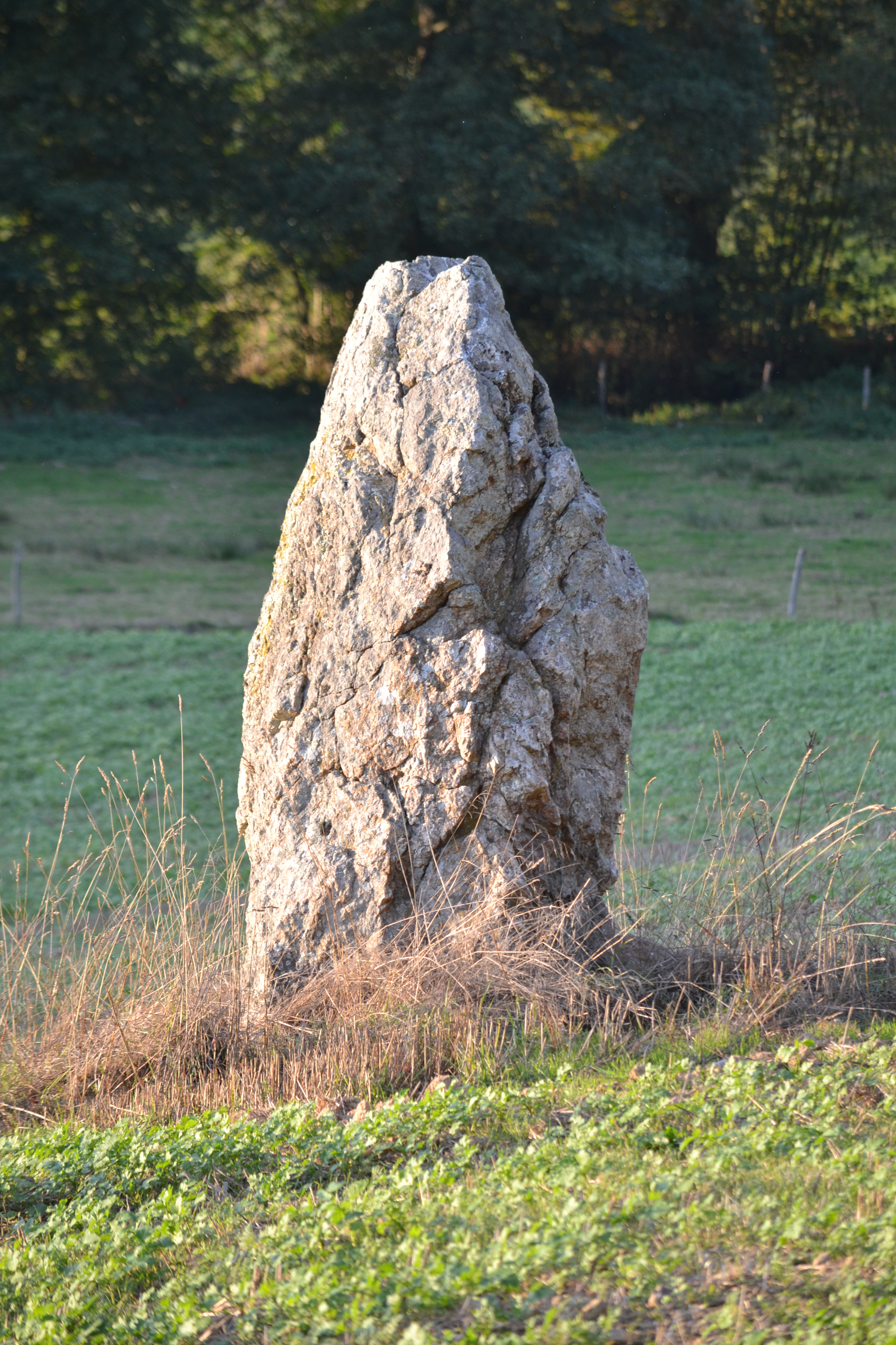 Menhir du Bodel à Caro (56).